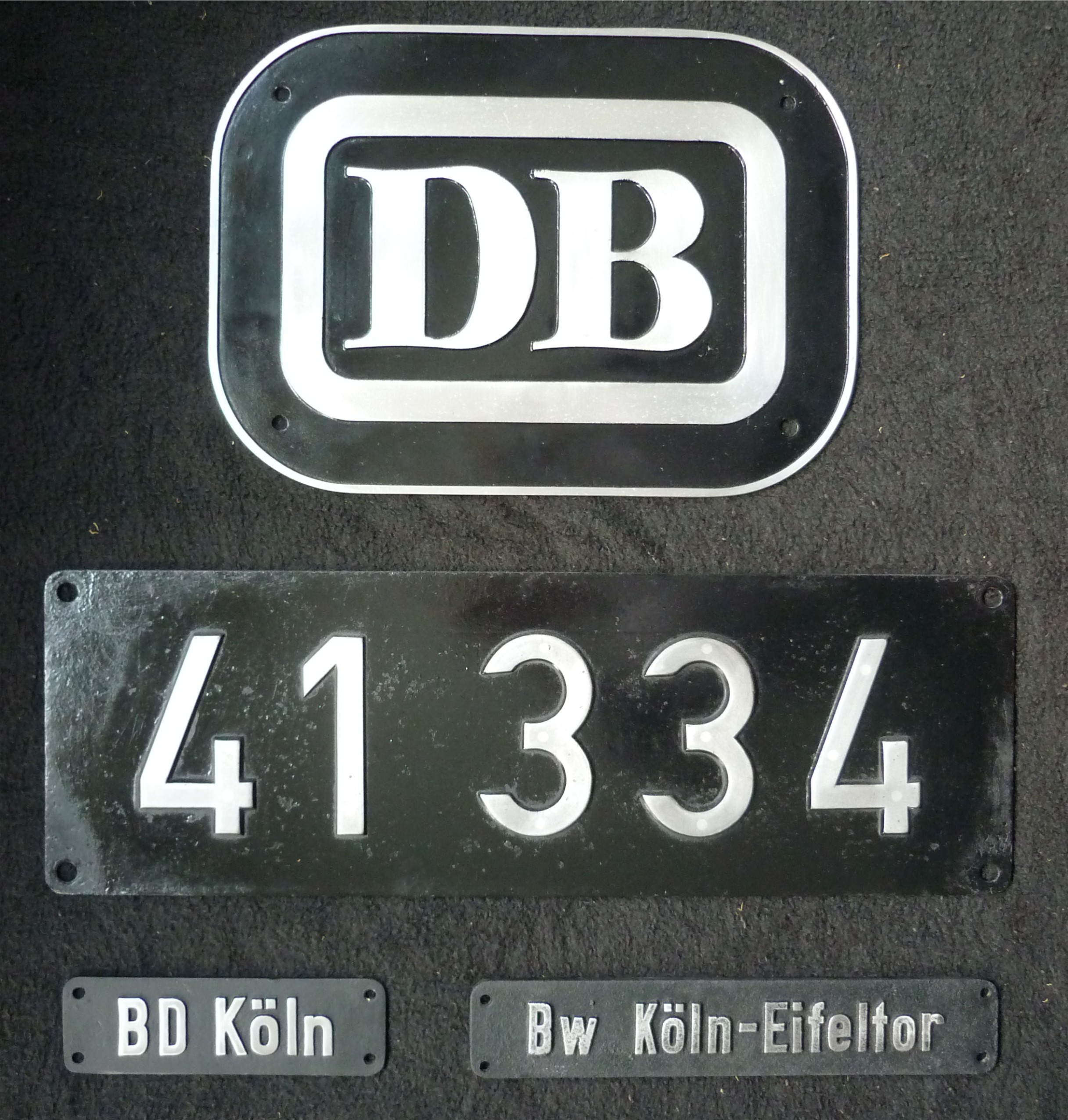 Dampflok Schildersatz